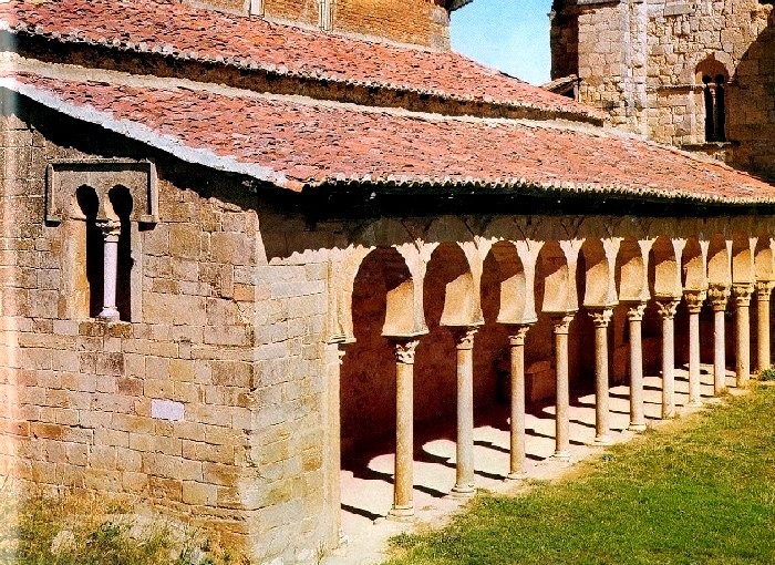 date : mars 2001.